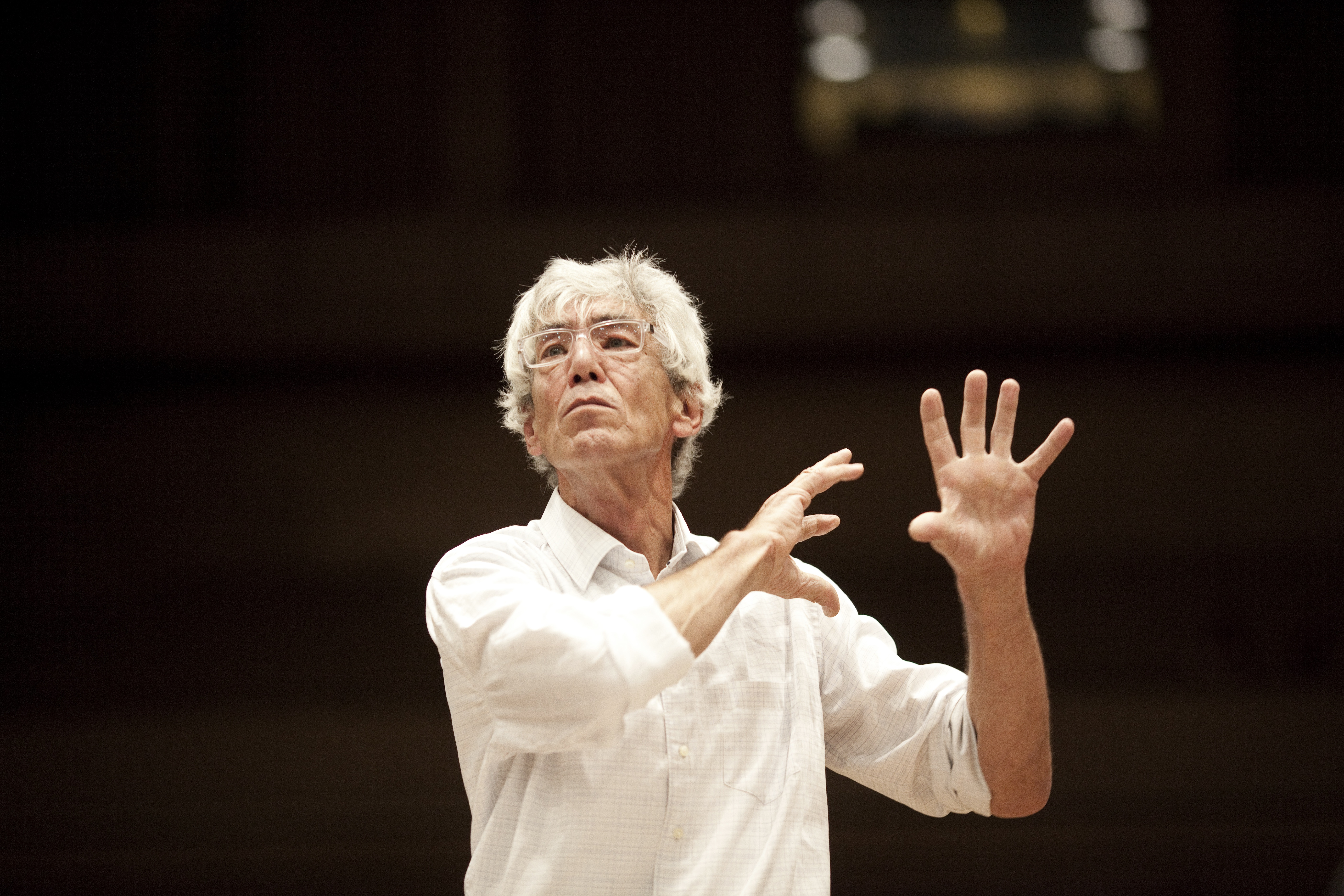 Nederlands dirigent en componist